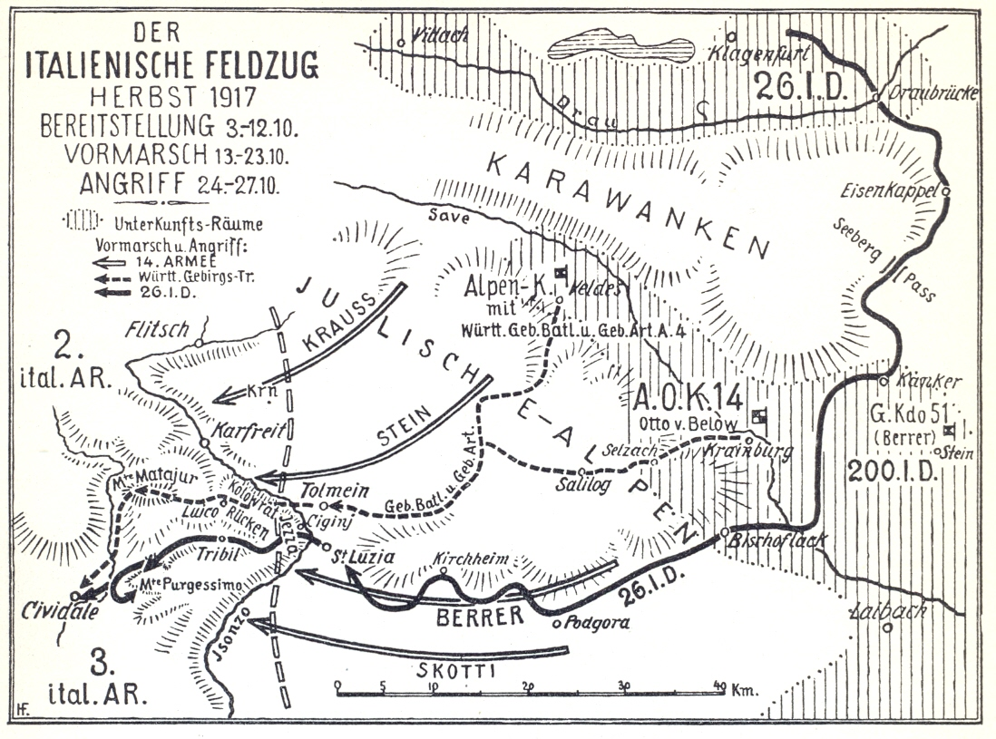 Karte: Der Italienische Feldzug Herbst 1917, Bereitstellung,Vormarsch, Angriff